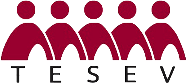 TESEV Logo